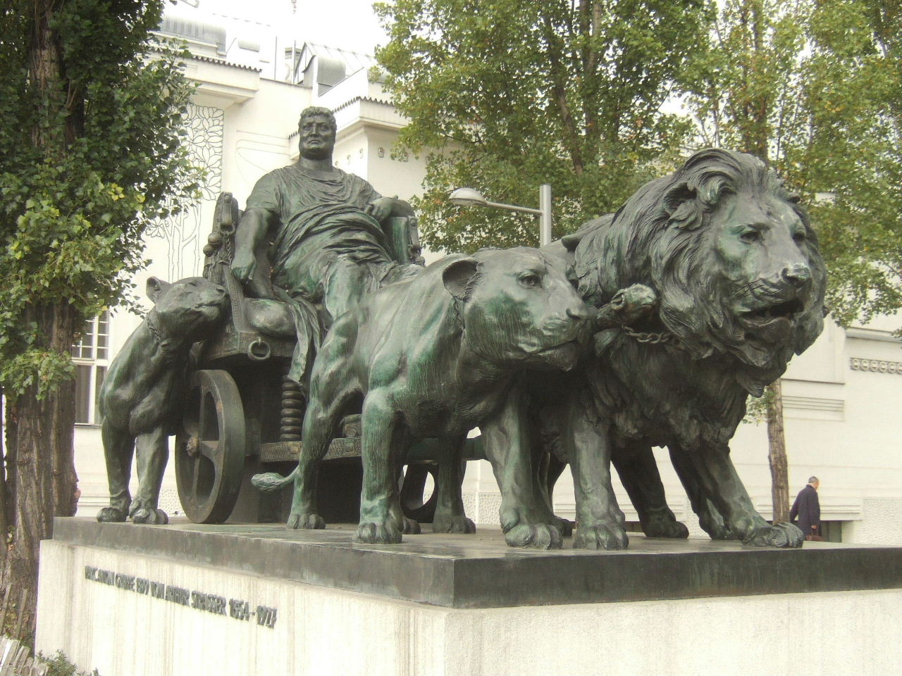 Arthur Strasser: Marc Anton Gruppe (1899) vor dem Wiener Secessionsgebäude